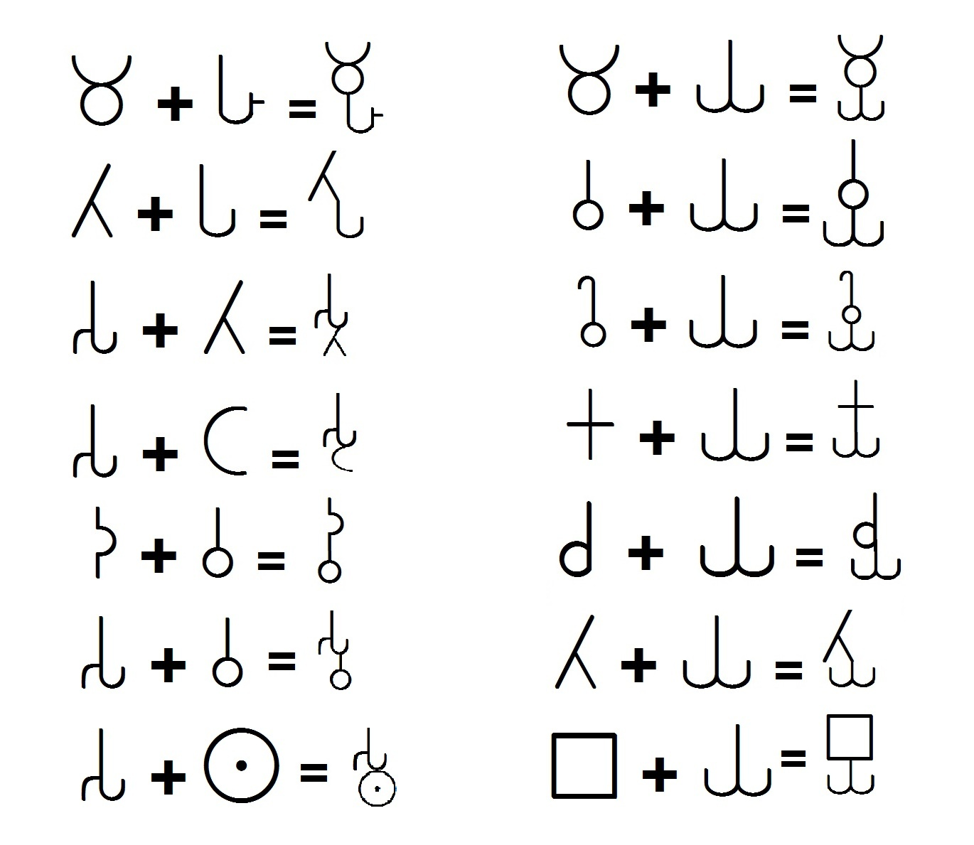 सम्राट अशोकाच्या शिलालेखात आढळलेली जोडाक्षरे